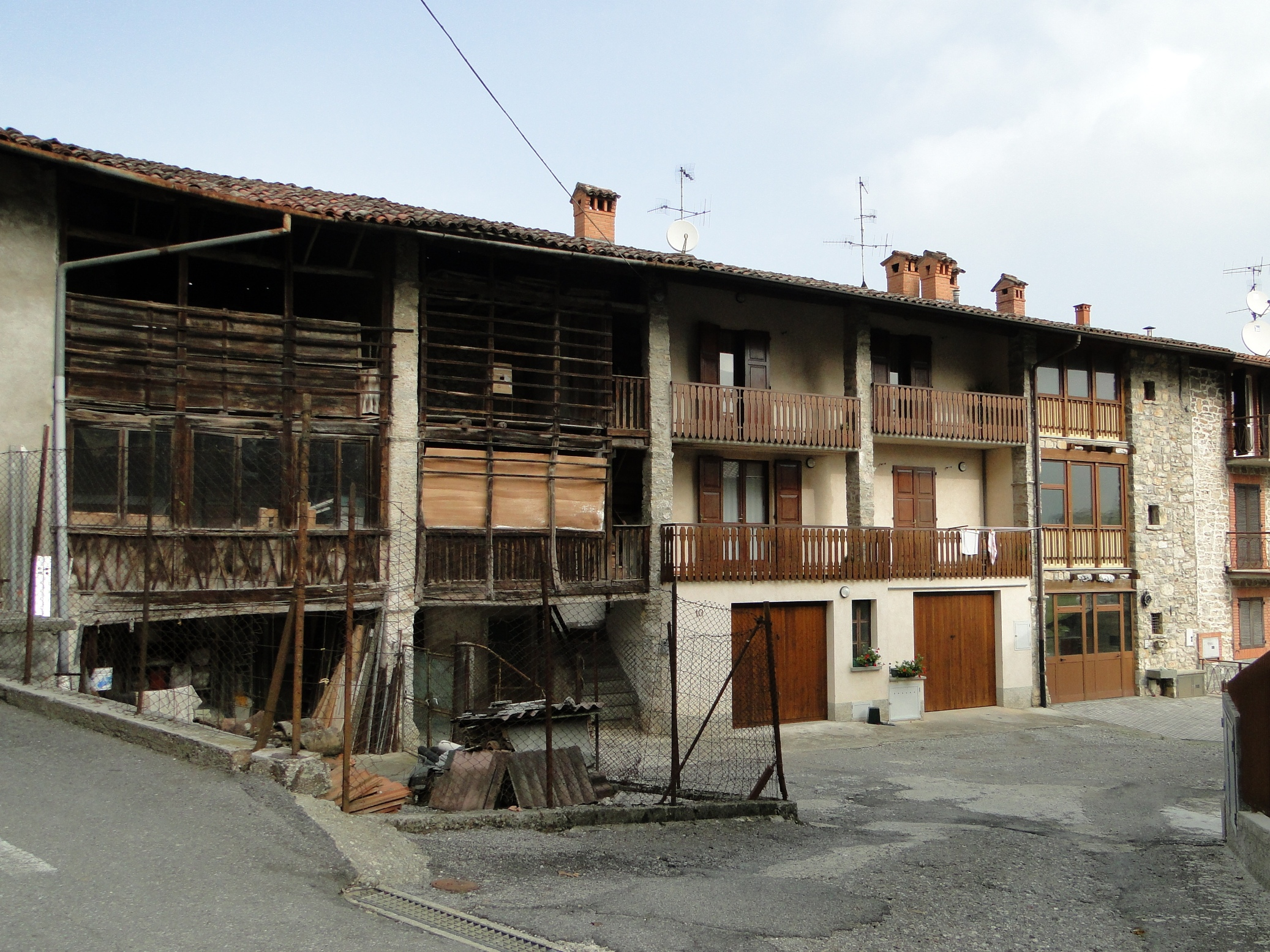 Fiobbio di Albino (BG), edificio rustico